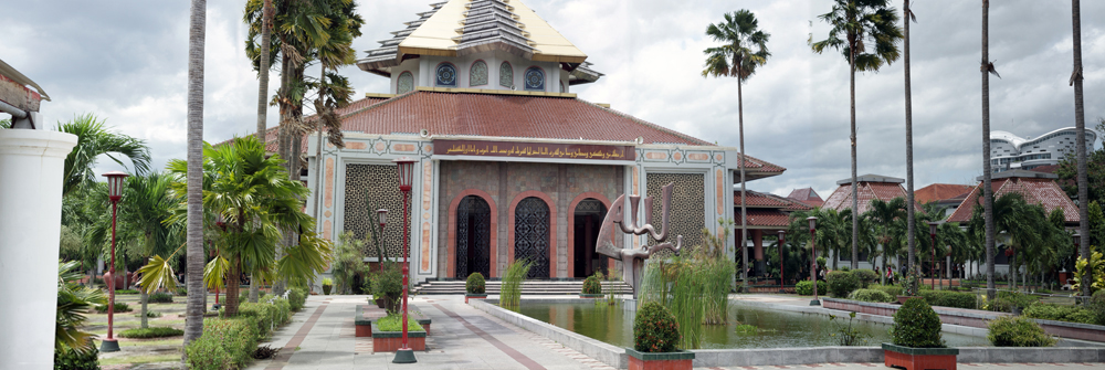 Masjid Kampus UGM